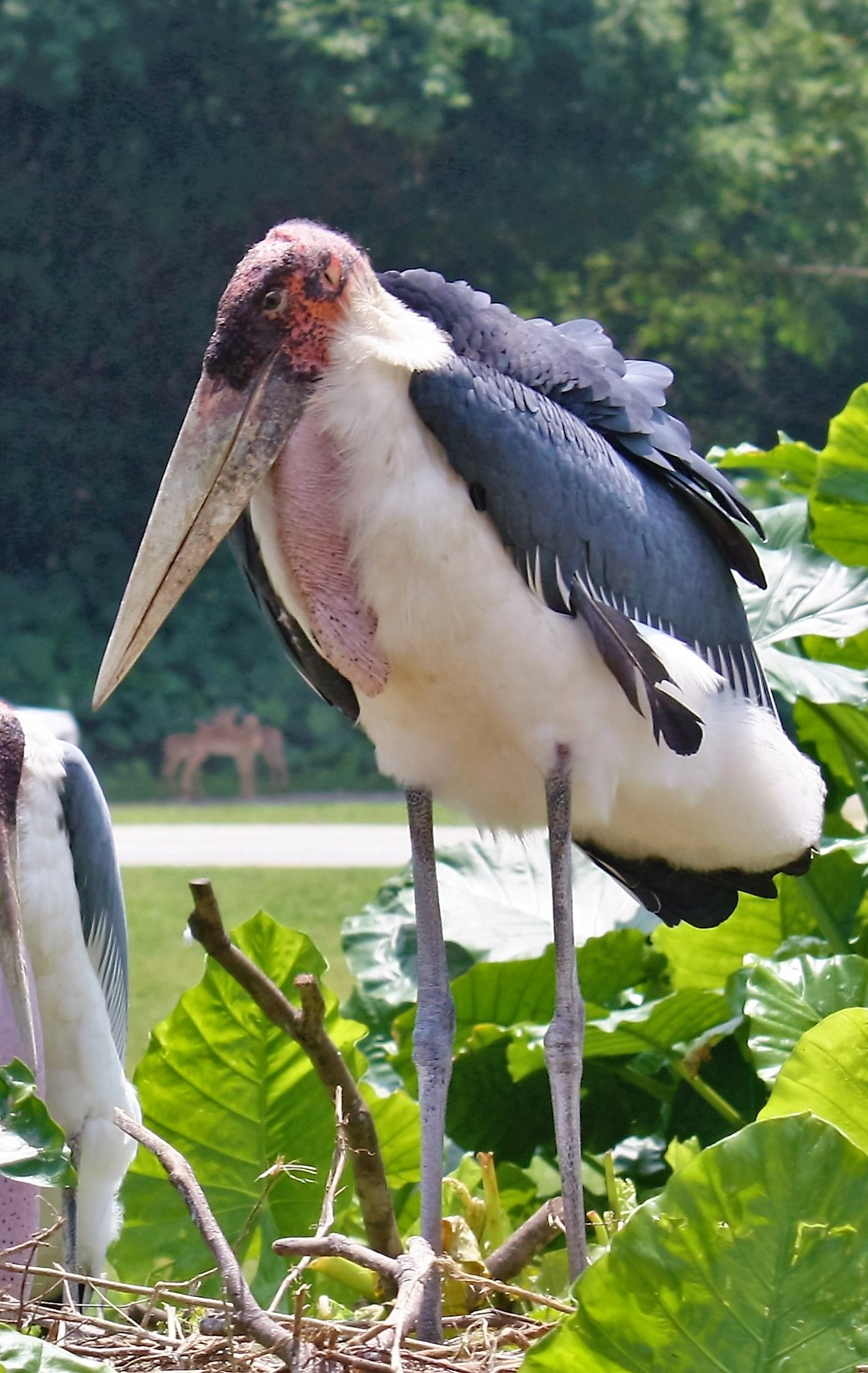 Zoo Guangzhou